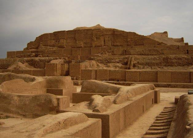 Zigurat